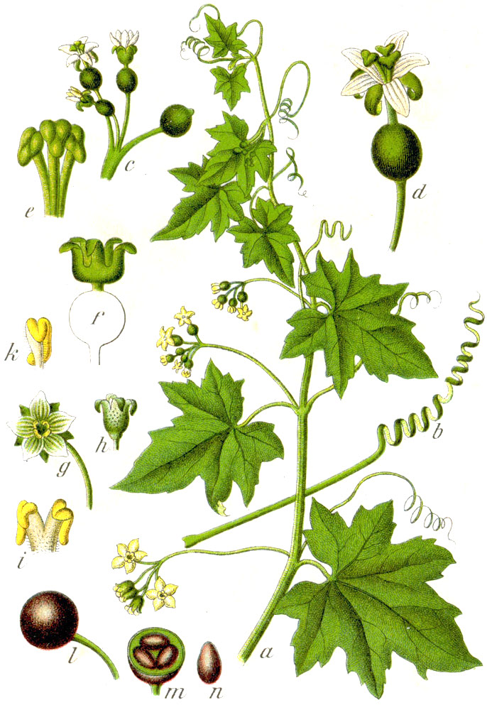 Bryonia monoica Aitch. & Hemsl. (1886) FloraWeb.de: Schwarzfrüchtige Zaunrübe, Bryonia alba L. (1753, IPNI 291647-1) Original caption Schwarzfrüchtige Zaunrübe, Bryonia monoeca